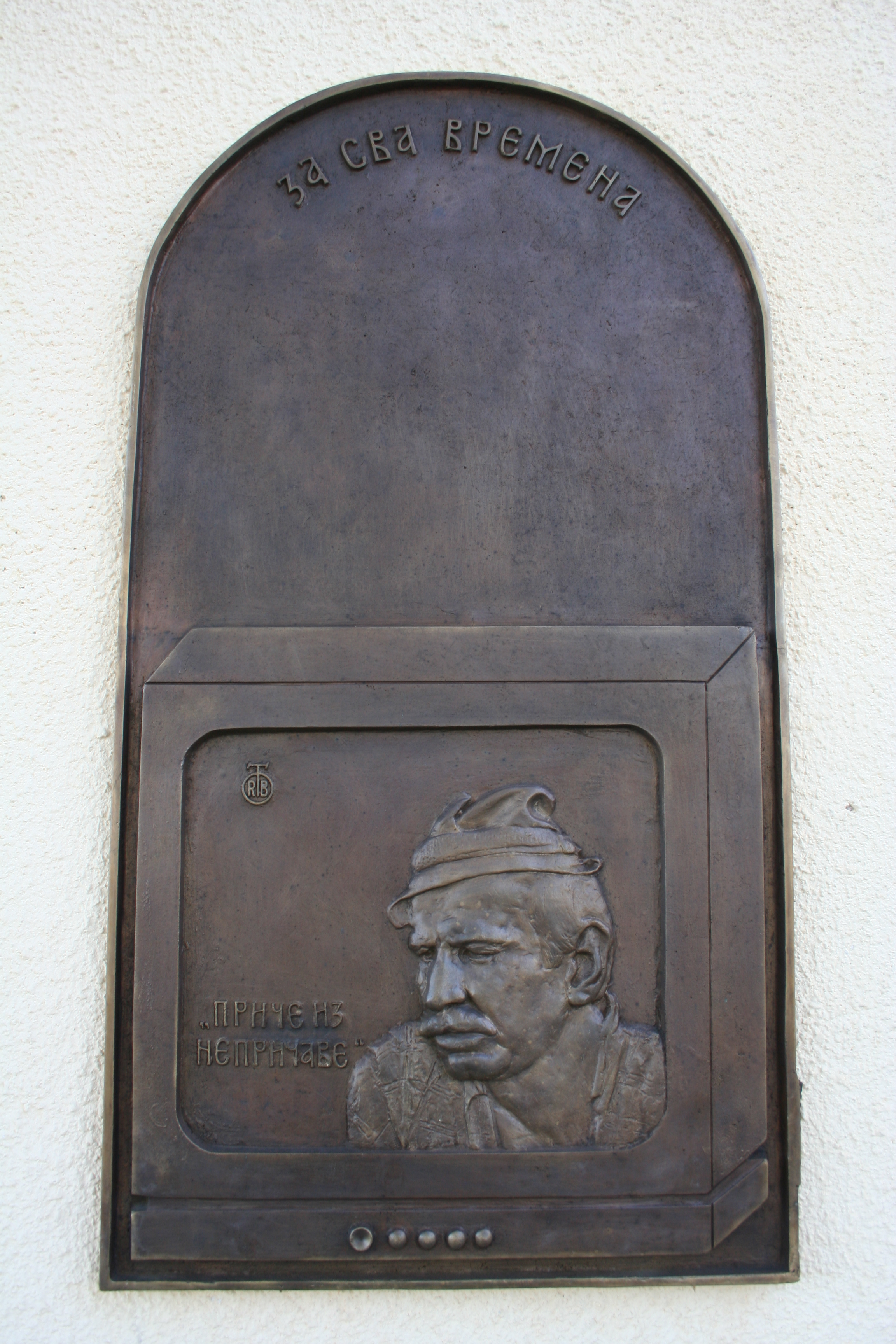 Spomen ploča posvećena seriji RTS "Priče iz Nepričave" i Zoranu Radmiloviću, Nepričava